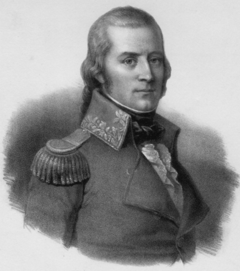 Alois Reding, (*6. März 1765 in Schwyz; † 5. Februar 1818 in Schwyz) Schweizer Politiker und Militär